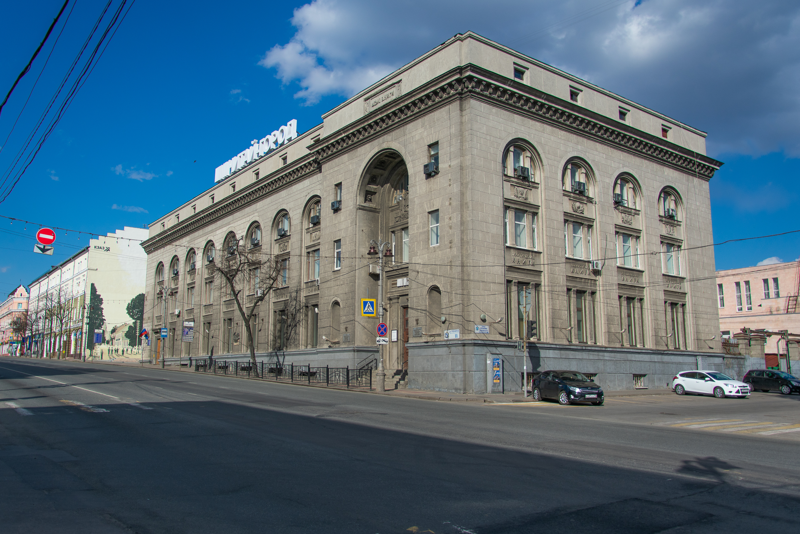 Дом Книги на улице Ленина в Курске